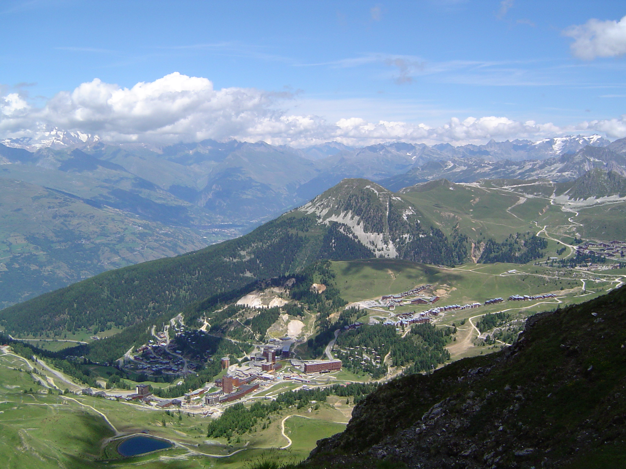 Vue de la station de sport d'hiver de La Plagne (Savoie, France) prise depuis le Mont Jovet.